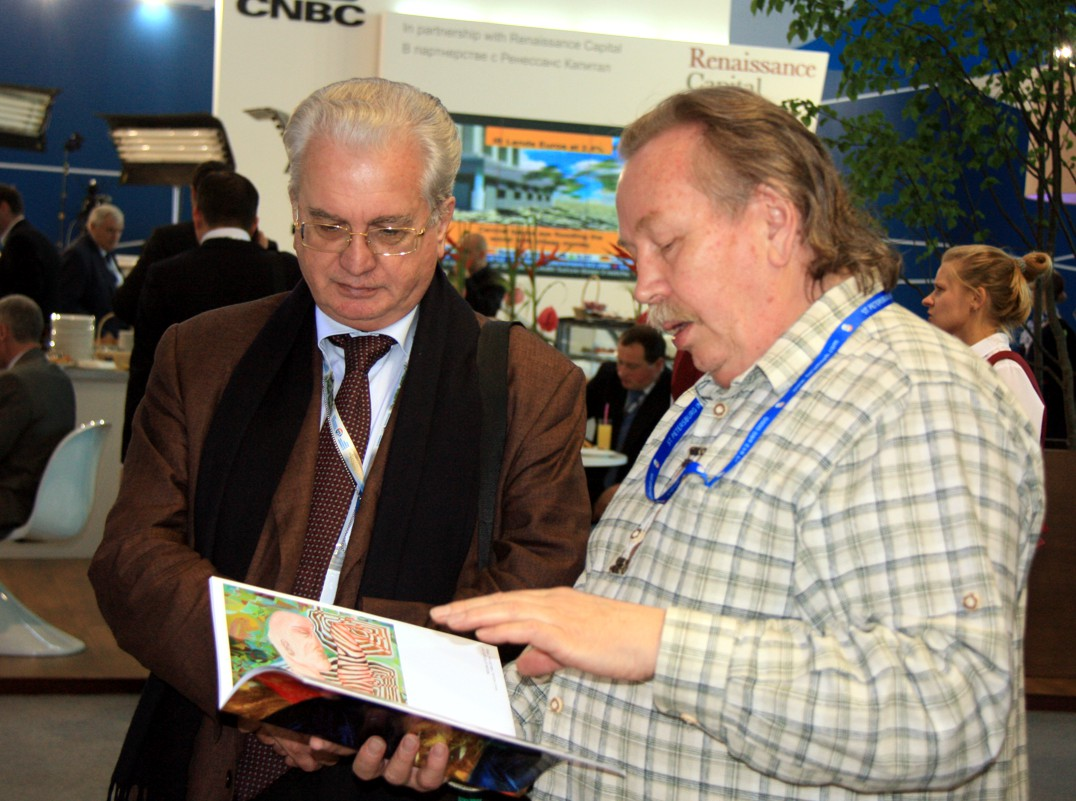 Директор Эрмитажа Михаил Борисович Пиотровский у стенда известного художника Алексея Алексеевича Караева на Петербургском международном экономическом форуме в 2012г.